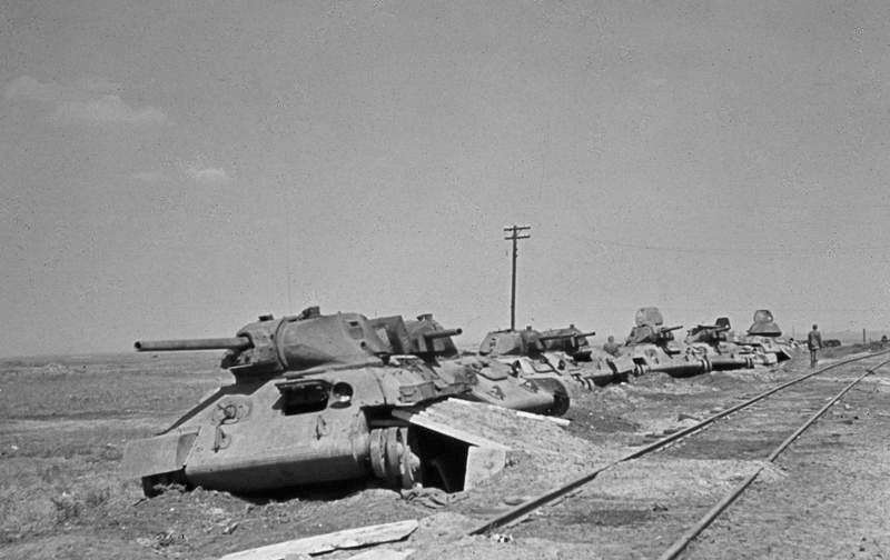 Title: Woroschilowka-Stalingrad, zerstörte sowjetische Panzer T-34 Extra information